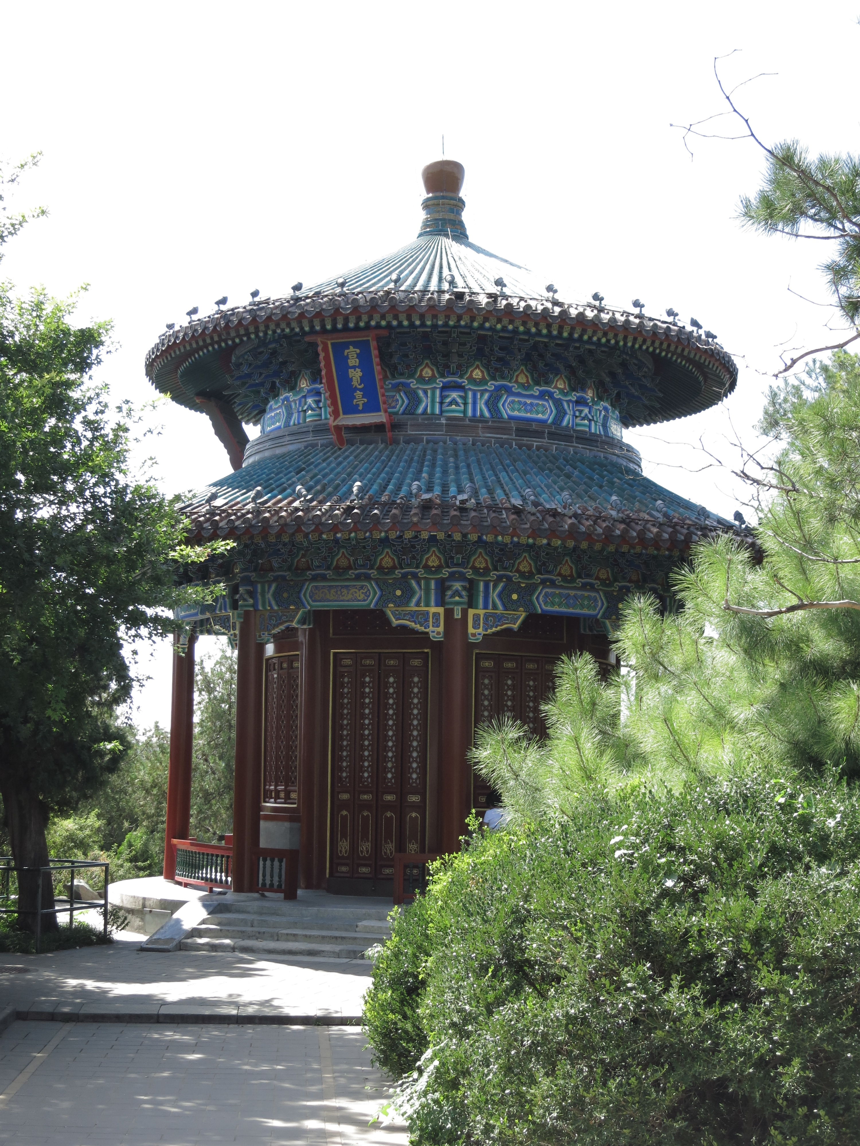 景山公園西山的富覽亭